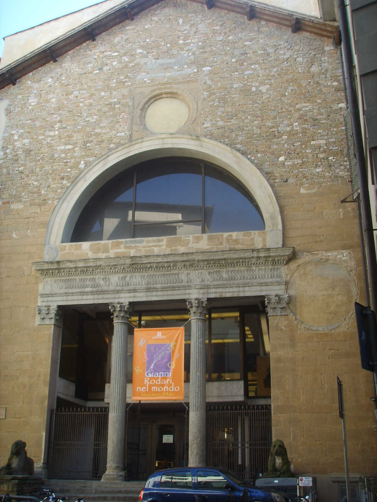 Chiesa_di_San_Pancrazio,_facciata